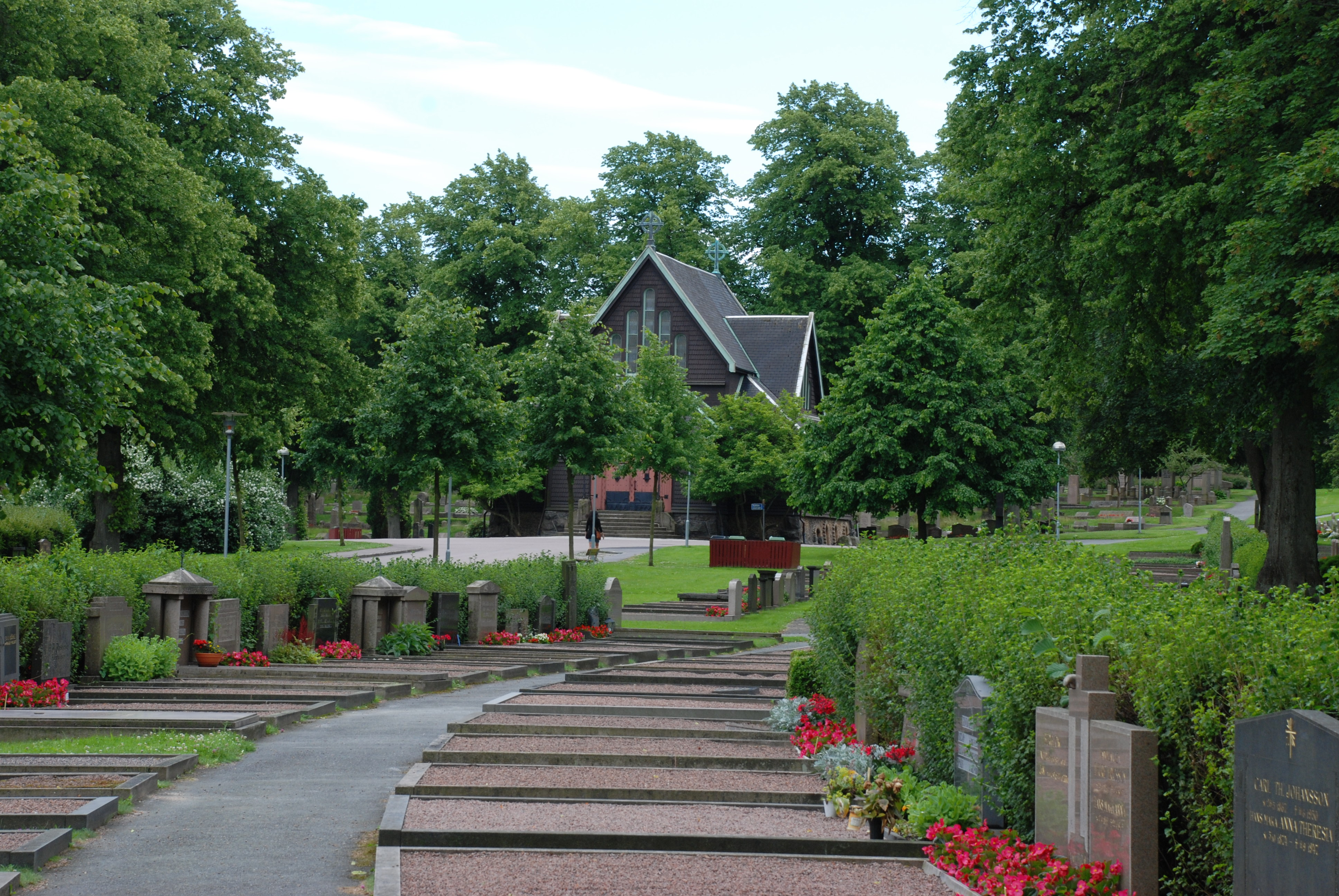 Sankt Matteus kapell på Västra kyrkogården i Göteborg.